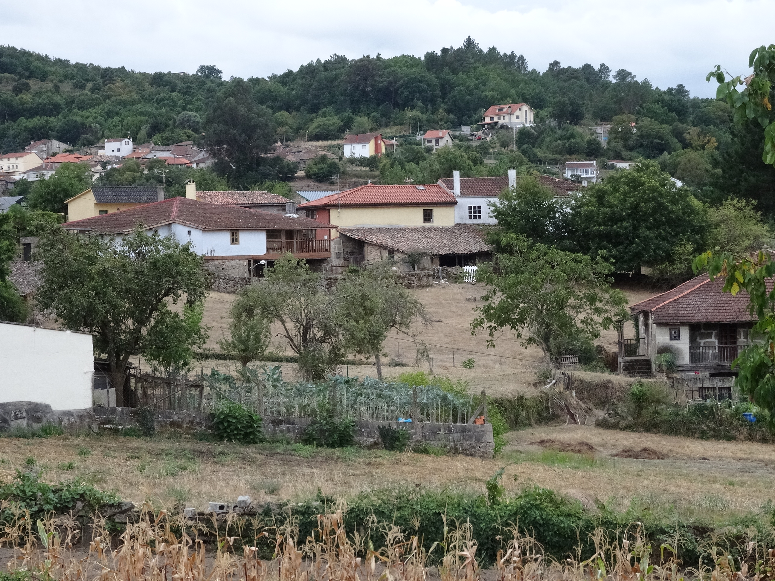 Vista O Pereiro de Aguiar, Ourense